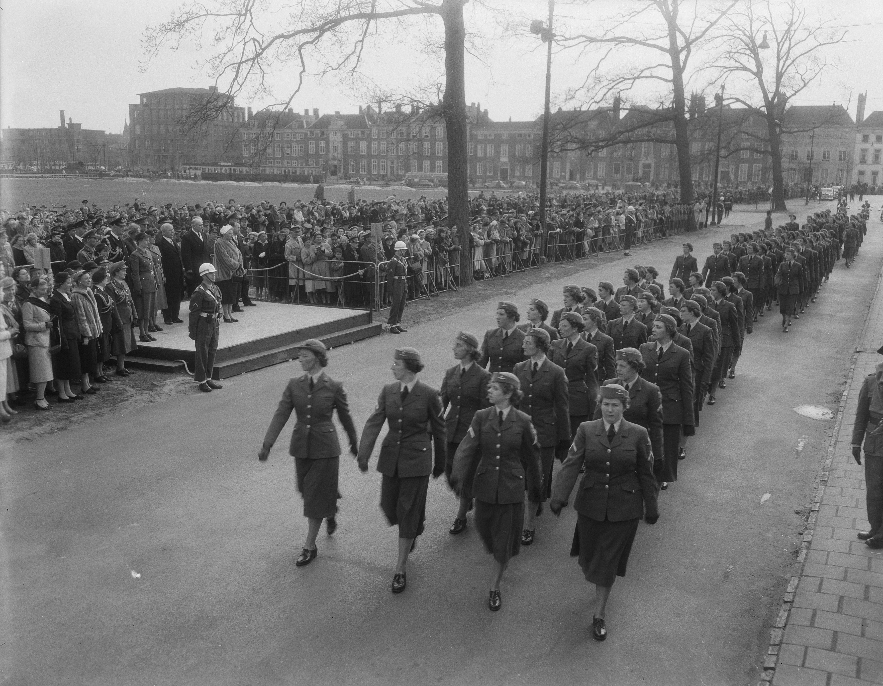 Collectie / Archief : Fotocollectie Anefo Reportage / Serie : [ onbekend ] Beschrijving : 10-jarig bestaan Milva defile van de Koningin Den Haag Datum : 6 mei 1954 Locatie : Den Haag, Zuid-Holland Trefwoorden : Defile Fotograaf : Duinen, […] van / Anefo Auteursrechthebbende : Nationaal Archief Materiaalsoort : Negatief (zwart/wit) Nummer archiefinventaris : bekijk toegang 2.24.01.04 Bestanddeelnummer : 906-4497